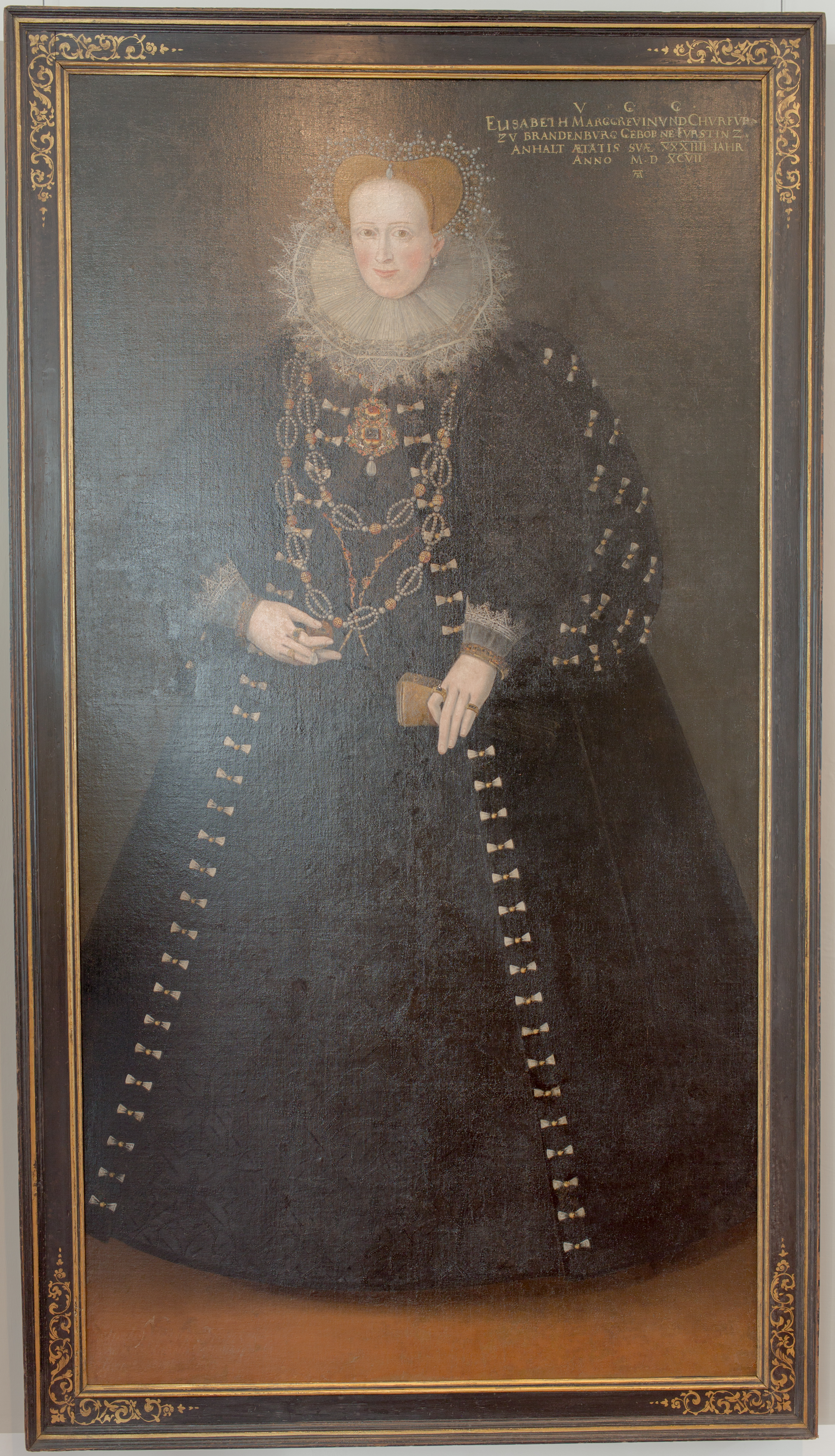 Andreas Riehl d. J. Kurfürstin Elisabeth von Brandenburg im alter von 33 Jahren. 1597 Elisabeth (1563–1607) war eine geborene Prinzessin von Anhalt. Sie heiratete 1577 den fast vierzig Jahre älteren Kurfürsten Johann Georg. Zu ihren Söhnen zählt Markgraf Cristian von Brandenburg-Bayreuth, der in der Ahnengalerie auf der Plassenburg auch diese Bildnisse seiner Eltern und Geschwister vorweisen konnte.